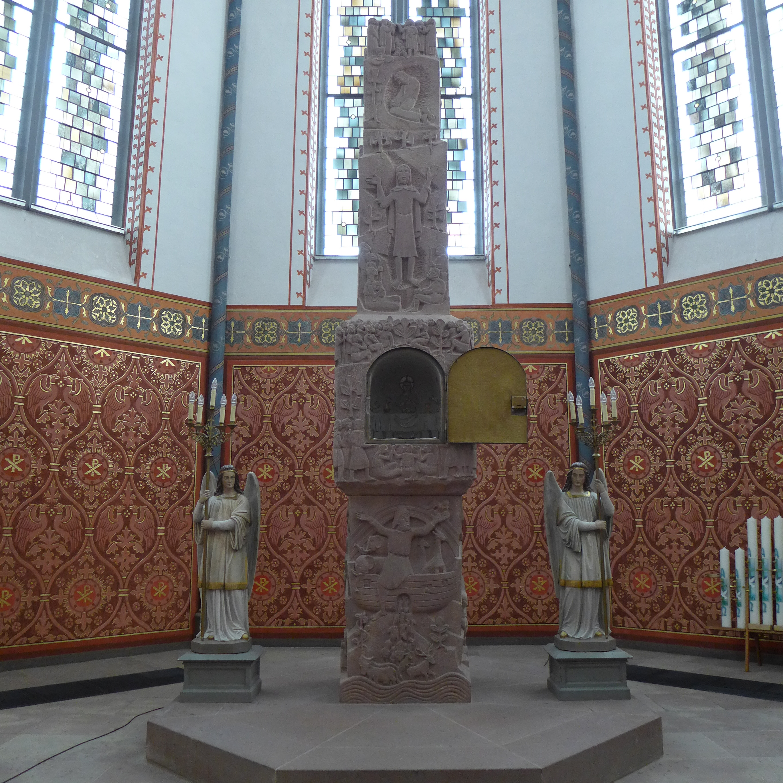 St. Katharina (Wallerfangen), Tabernakelstele